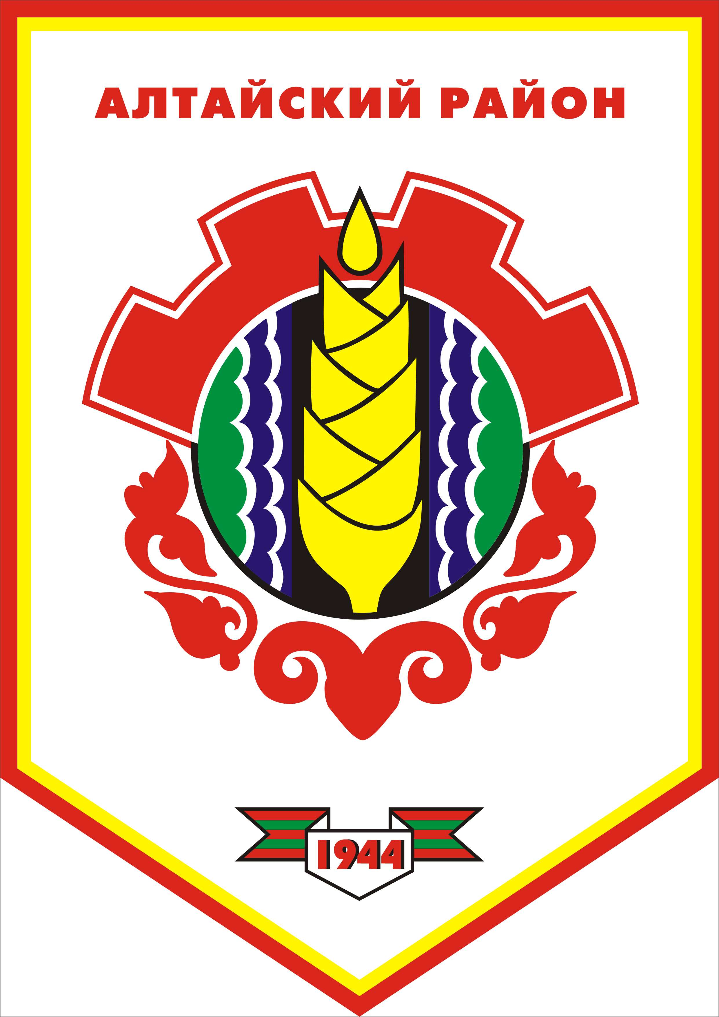 Герб Алтайского района